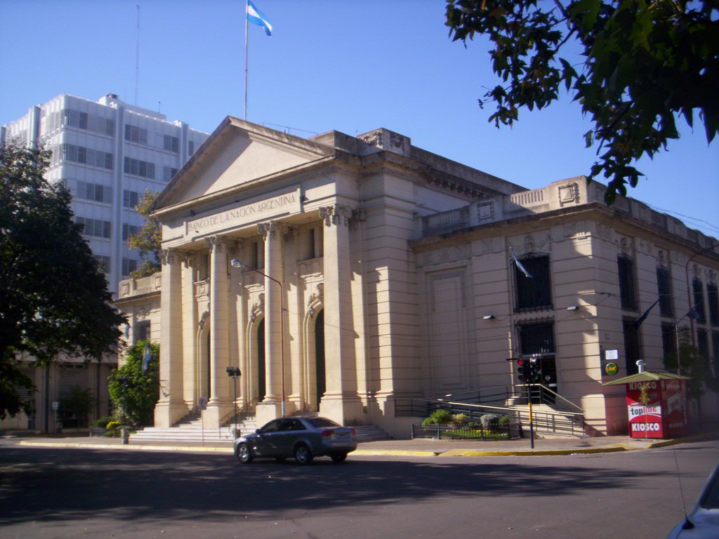 Banco Nación ubicado en Mayor López 26, en Junín, Argentina.